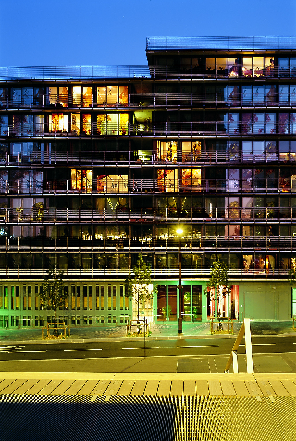 Opération de logements à Durkheim, Paris par Francis SOLER